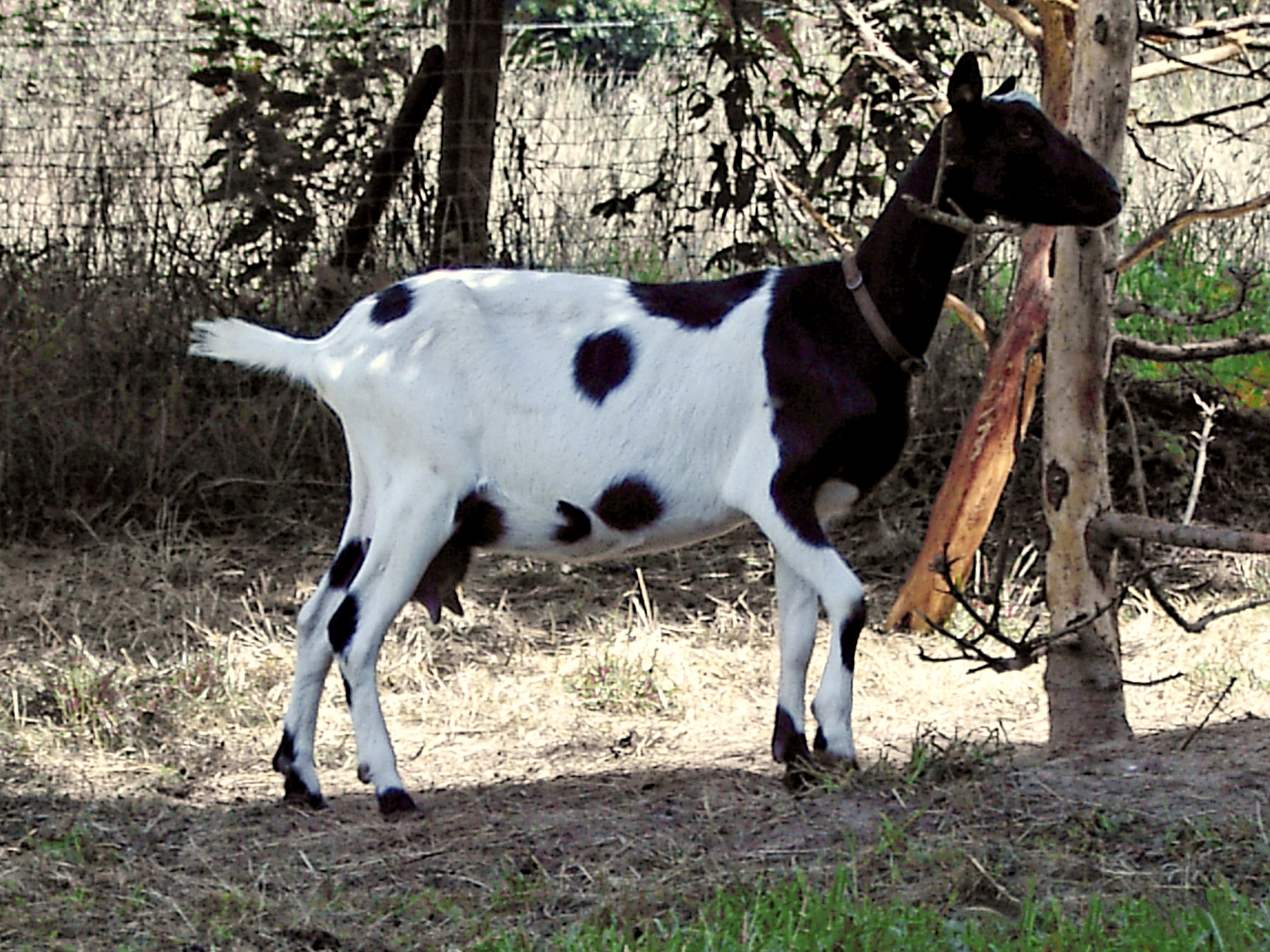 Bunte Holländische Ziege in der gewünschten Farbgebung schwarz/weiß